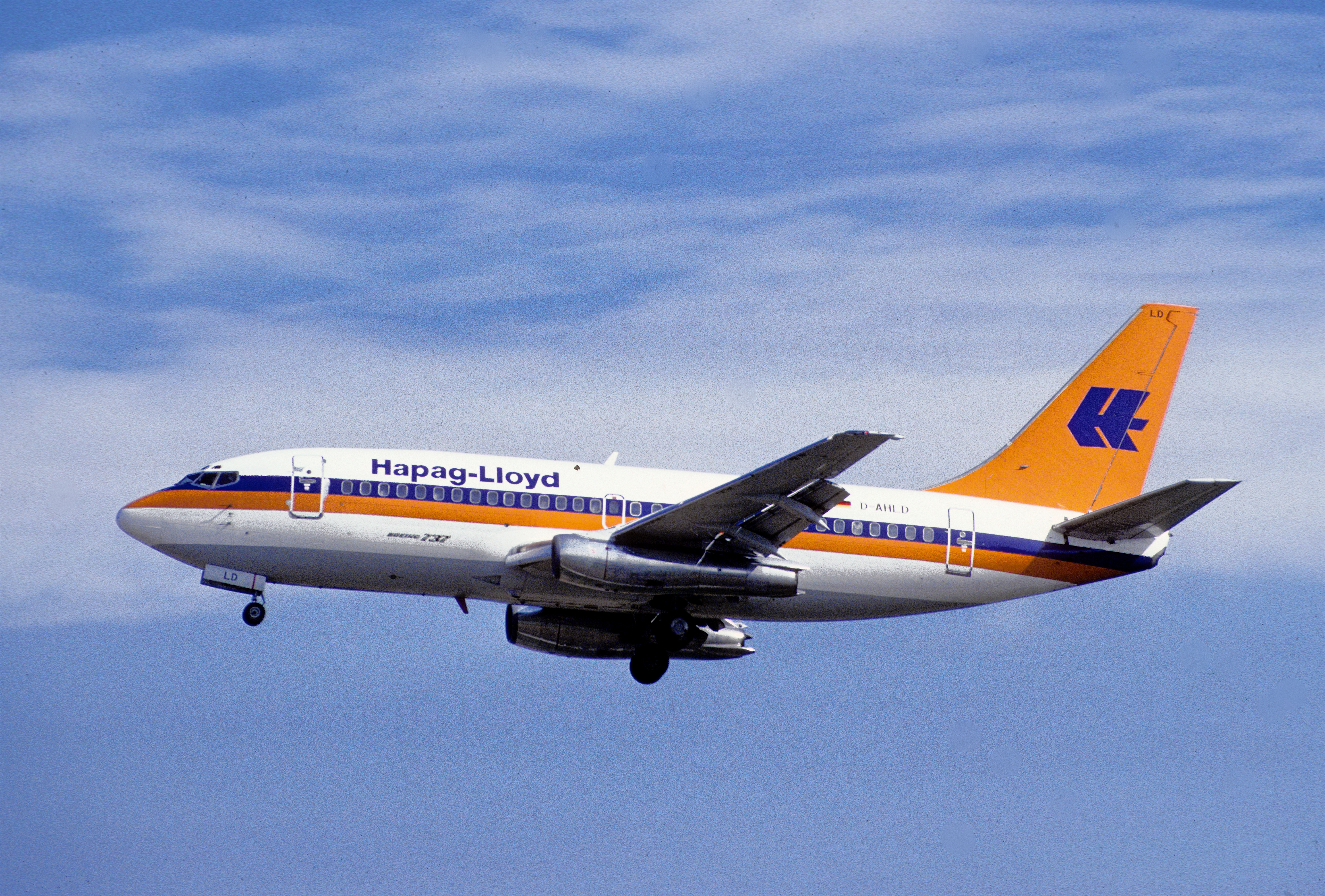 Hapag-Lloyd Boeing 737-2K5; D-AHLD, June 1988/ AQB